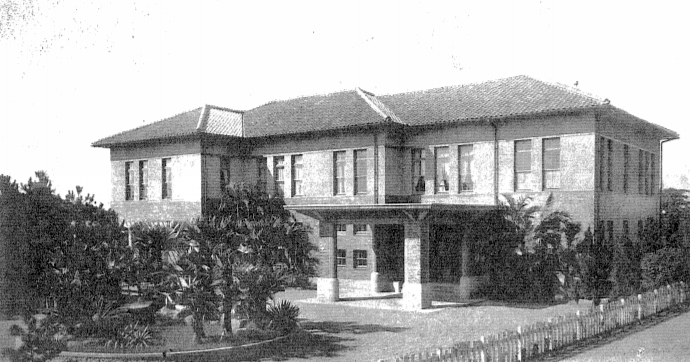 中文（台灣）: 為現今的新竹市立玻璃工藝博物館